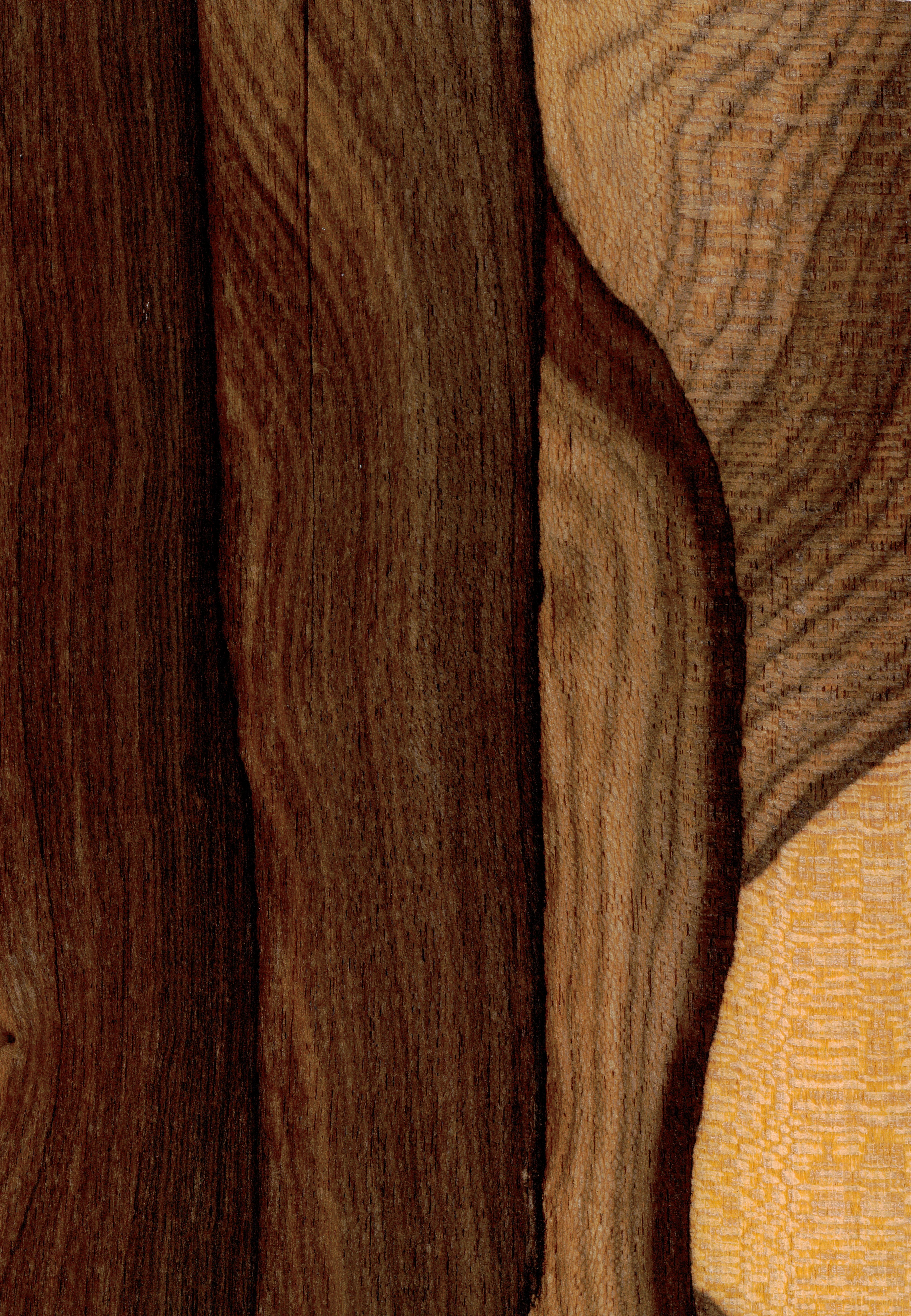 Cordia dodecandra ist eine Pflanzenart aus der Gattung der Kordien (Cordia) in der Familie der Raublattgewächse (Boraginaceae). Sie ist in Mittelamerika beheimatet und wird dort Ziricote und Siricote genannt.